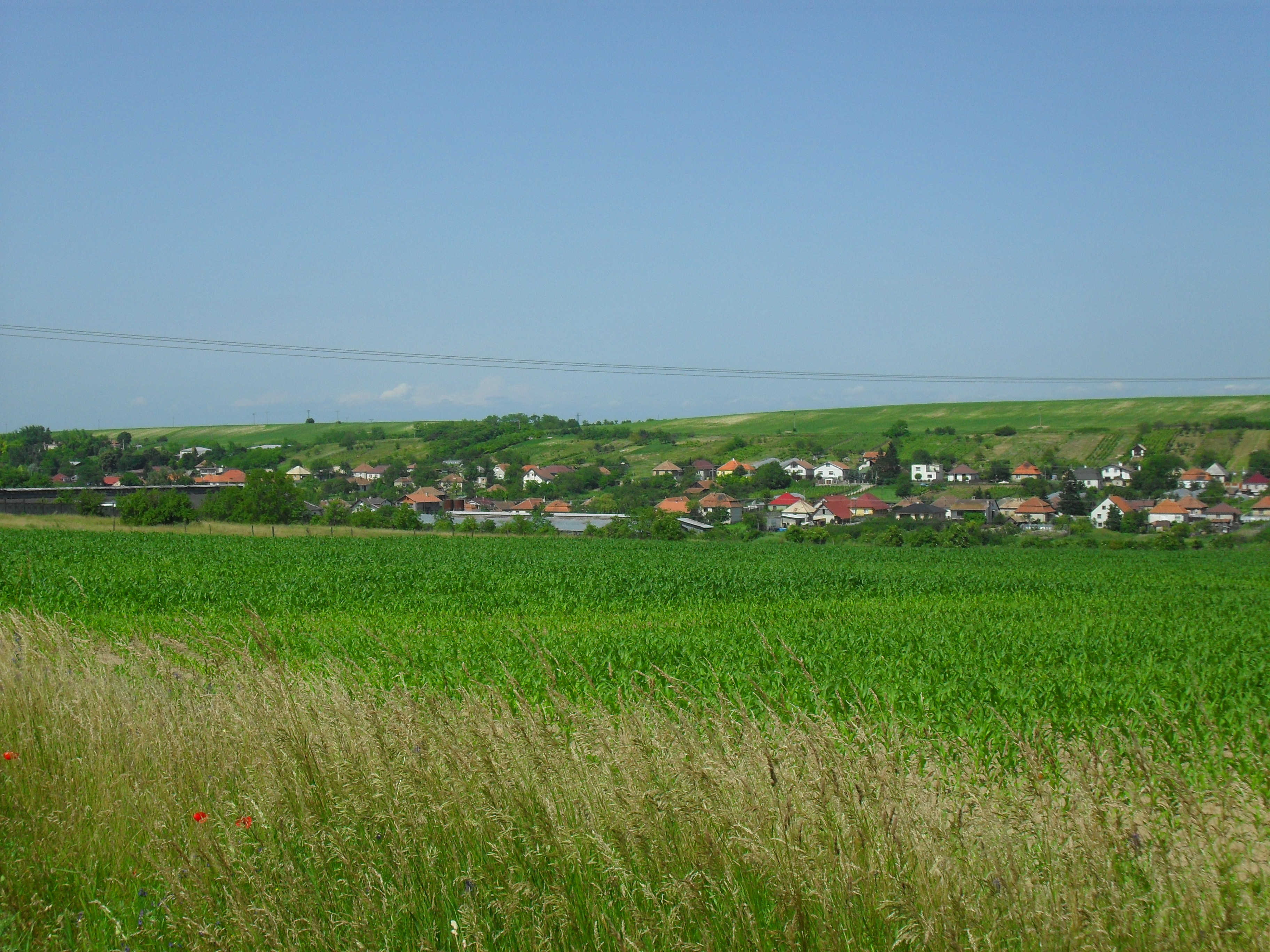 Újgyalla - látkép dél felől